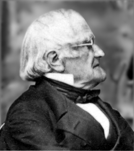 Фото Норденшёльд, Нильс Густав (Nils Nordenskiöld)